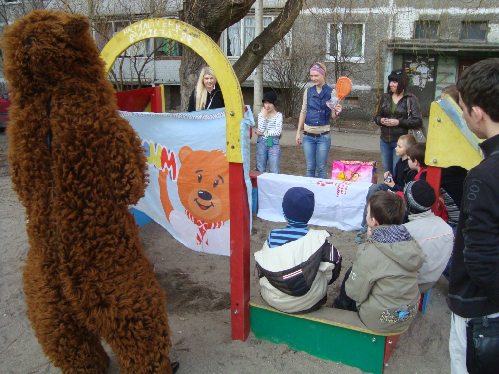 ДДР - Детская дворовая республика, движения МИШКИ (НАШИ). Дети совместно с вожатыми провили аукцион. Его участники за все время работы республики накапливали свои "мишко-рубли" и в этот день покупали подарки.